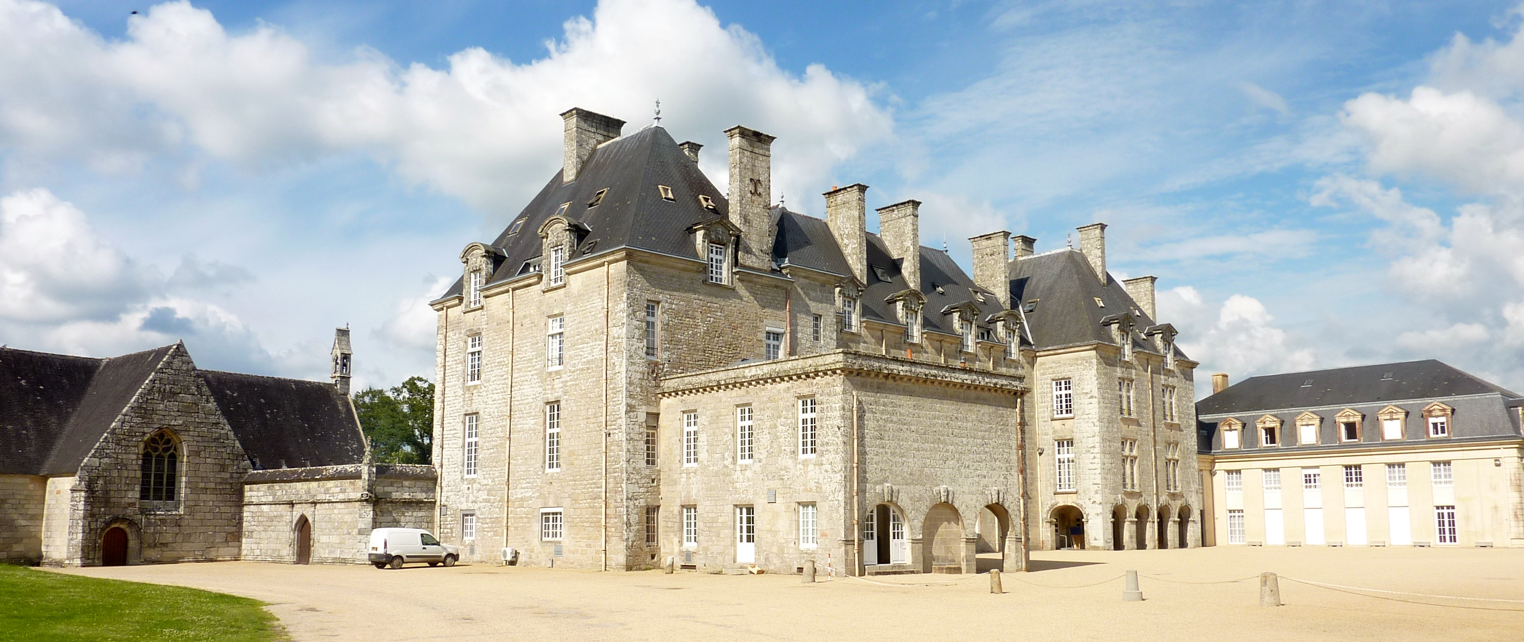 Le château de Pontcallec (Pont-Calleck) : vue extérieure d'ensemble.